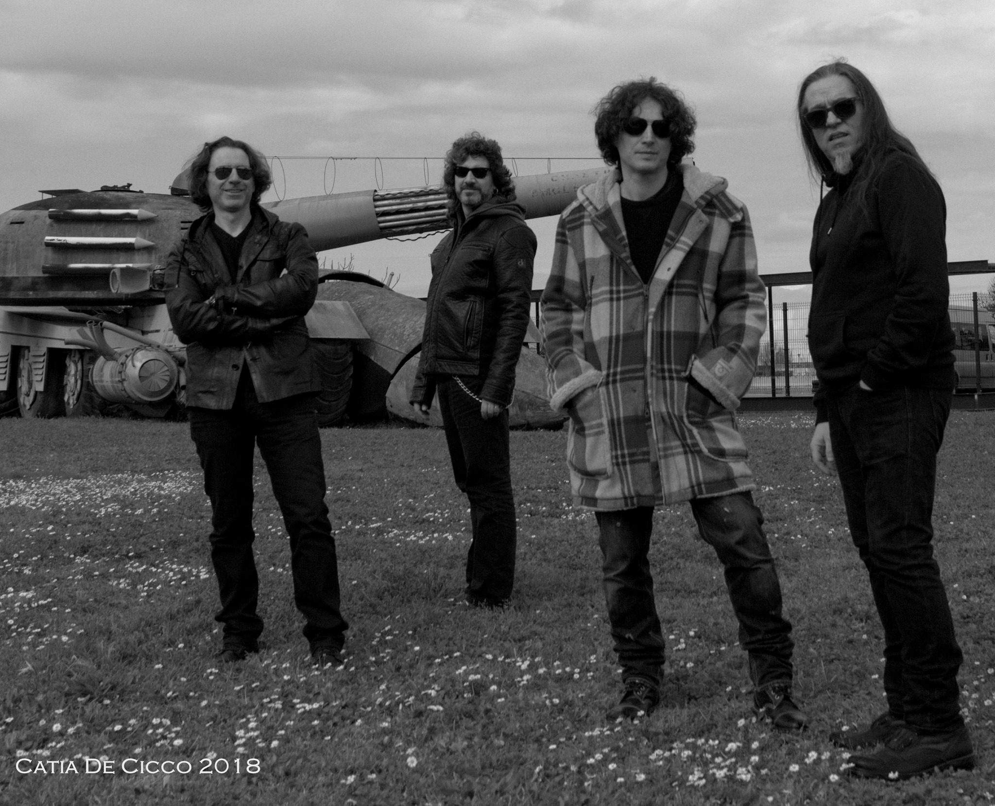 Offizielles Bandfoto